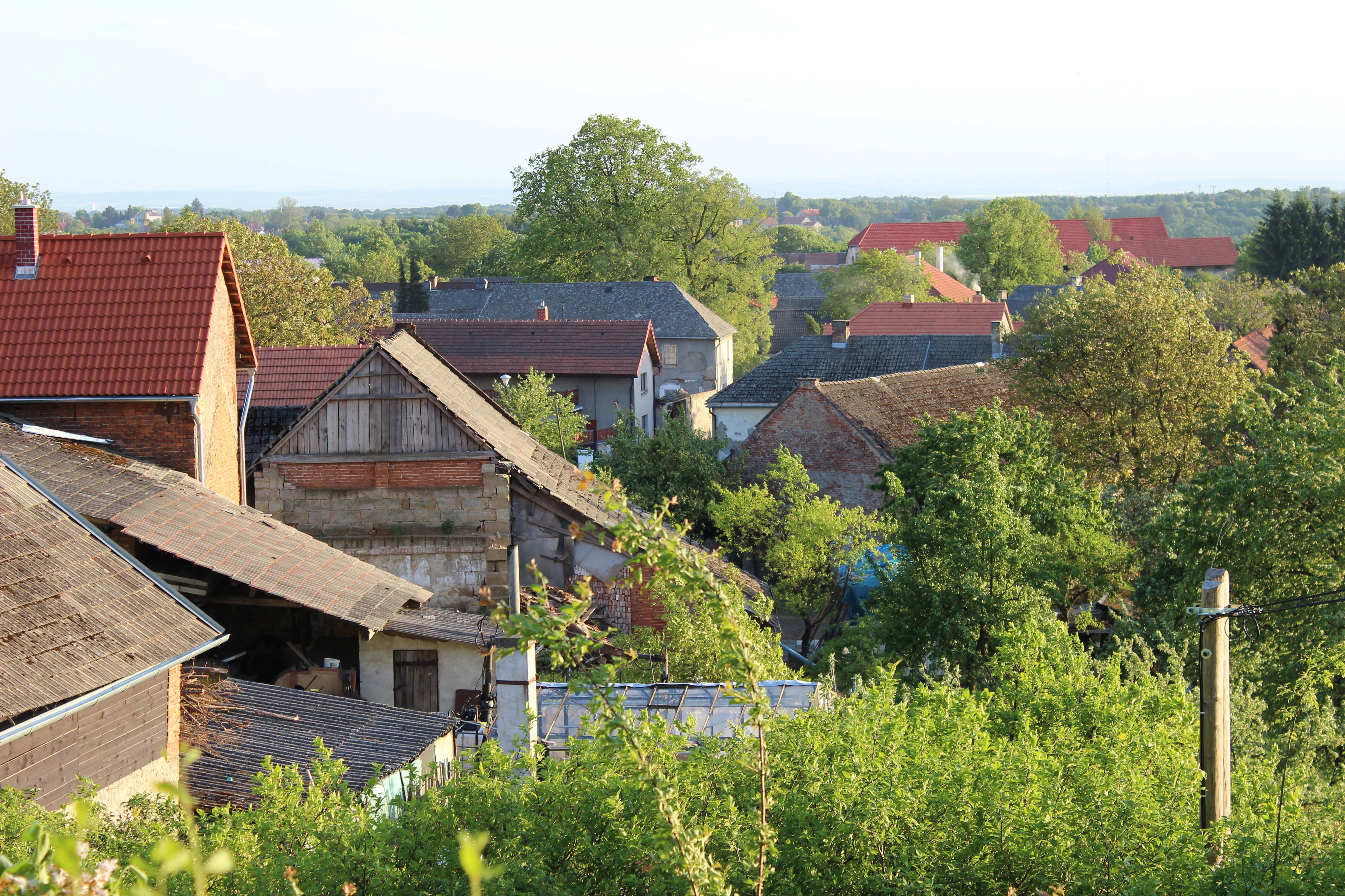 Mšeno-Sedlec, pohled od hospody. Project: Fotíme Česko